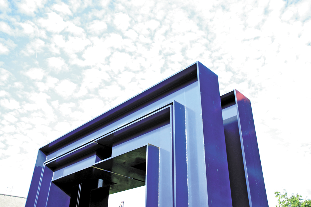 Das "Blaue Tor" am Eingang der Hochschule von der Mönchebergstraße, Künstler Eberhard Fiebig